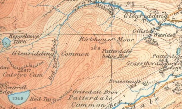 old OS map